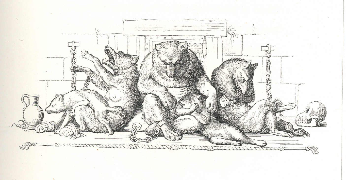 Vignette